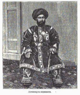 Астанакул-бий парваначи. Бухарский эмират.